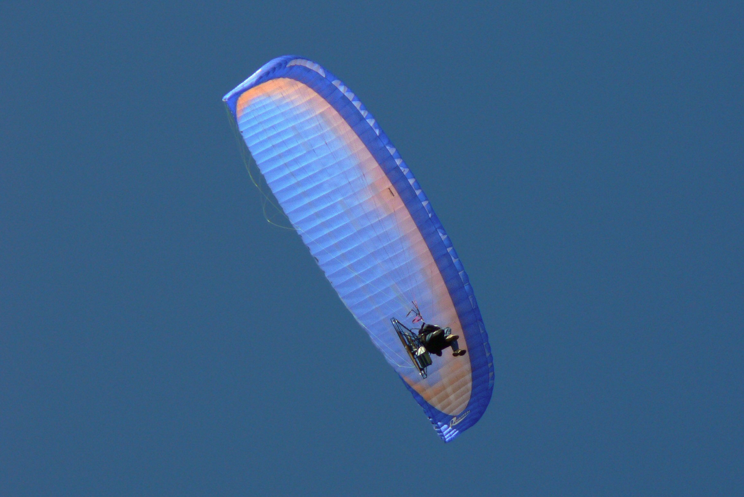 Parapente avec les Dents du Midi